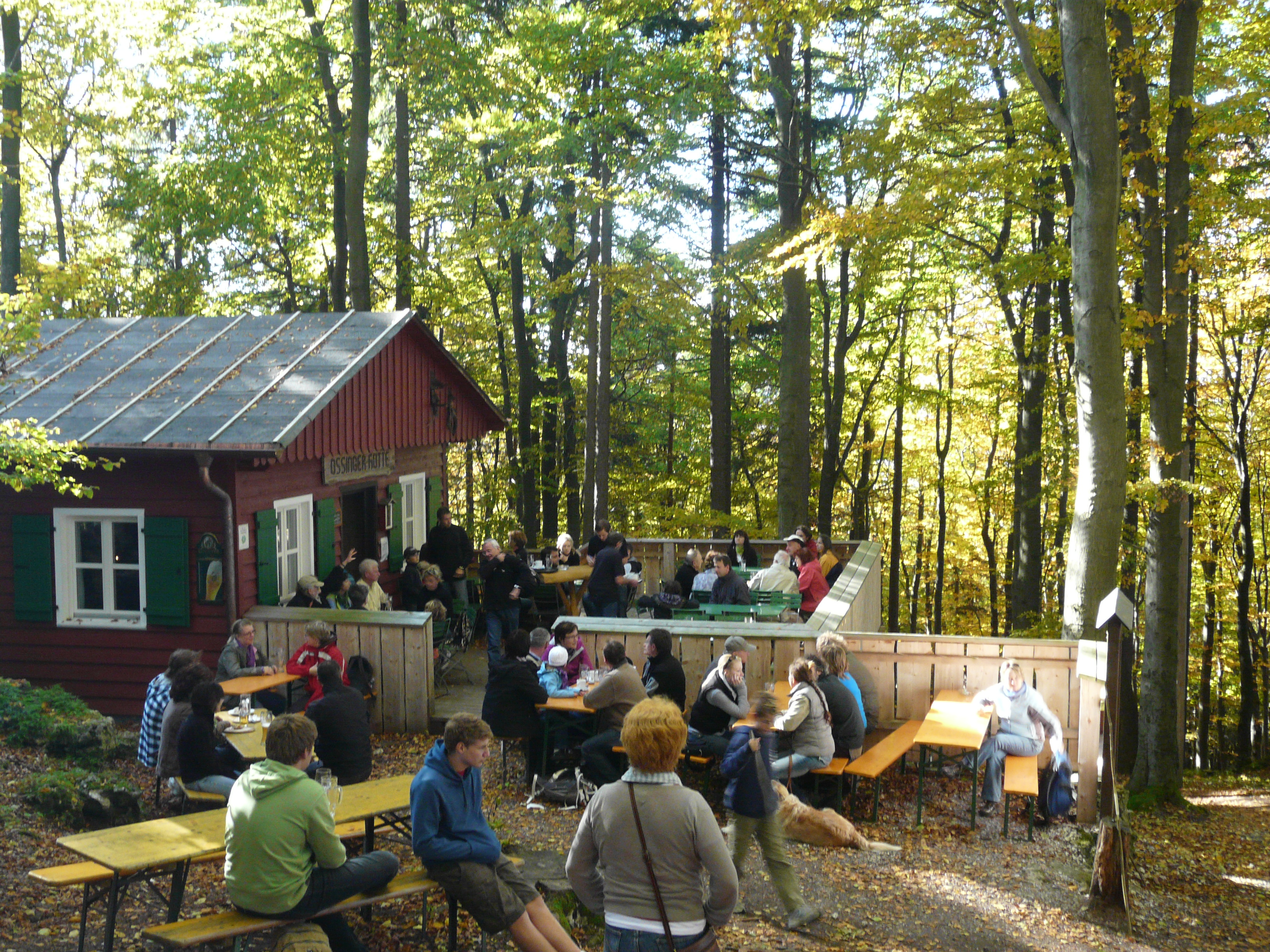 Die Ossinger-Hütte